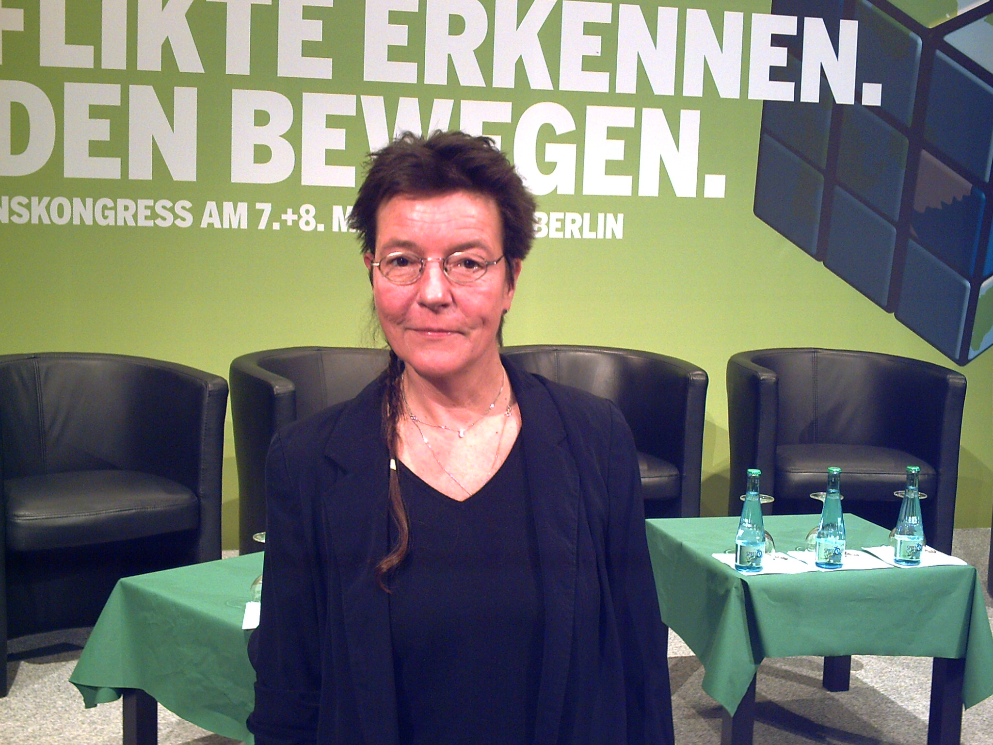 Angelika Beer, MEP, bei der Friedenskonferenz von Bündnis 90 / Die Grünen in Berlin